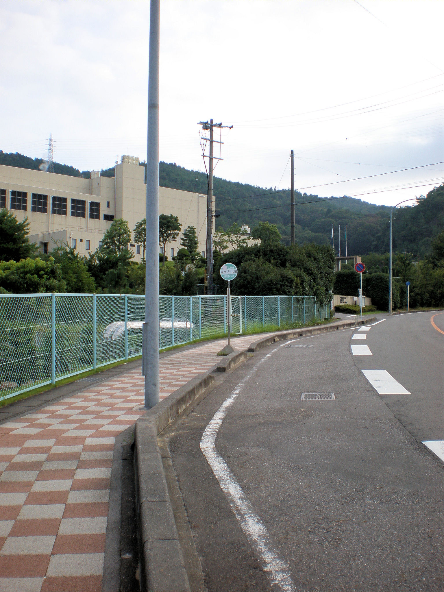 愛知県小牧市にある温水プール前停留所